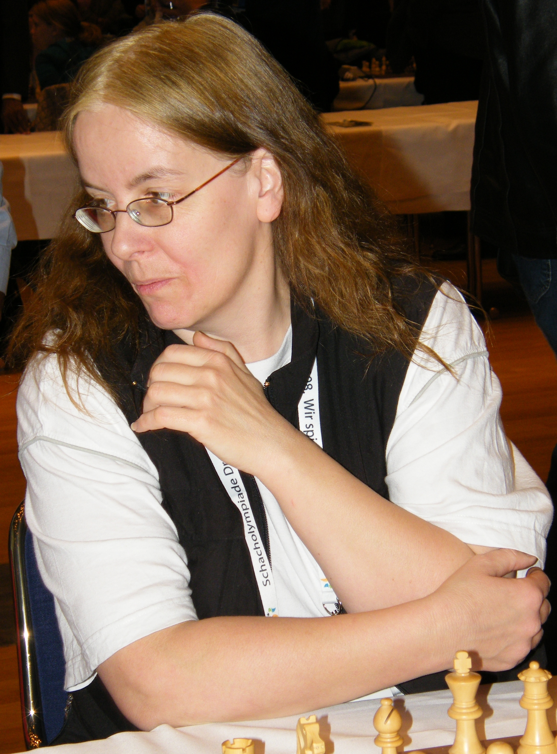 Barbara Hund bei der 38. Schacholympiade in Dresden 2008